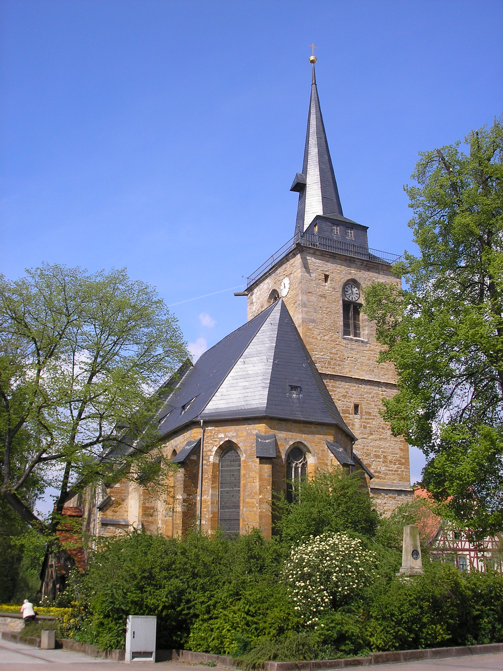 Die Stadtkirche St. Bonifatius in Sömmerda (Thüringen).